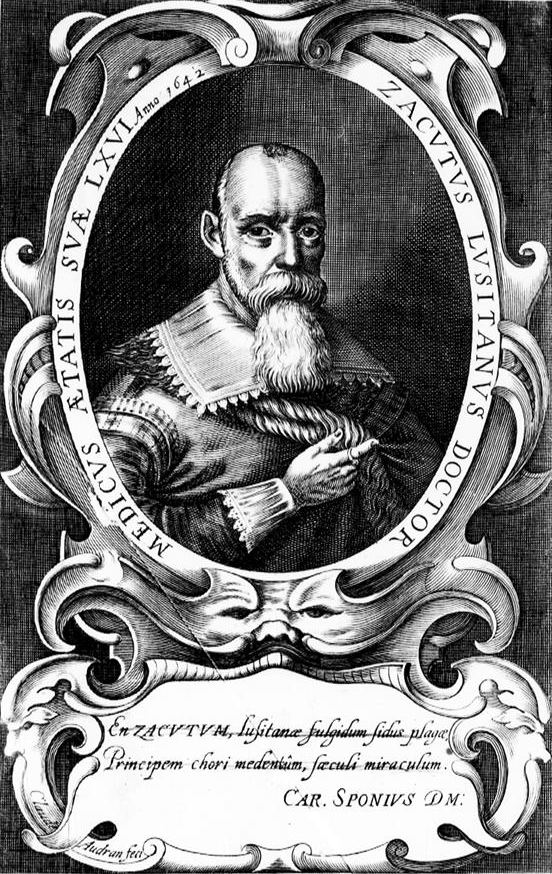 Retrato de Zacuto Lusitano, 1642